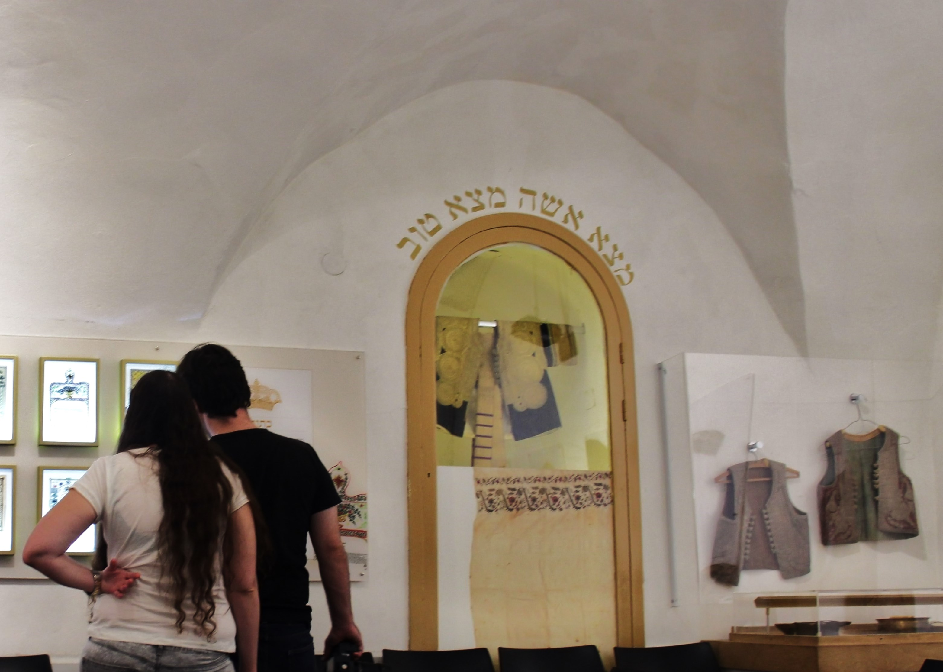 מוזיאון חצר היישוב הישן הוא מוזיאון אתנוגרפי ברובע היהודי בעיר העתיקה בירושלים המשקף את אורח החיים המסורתי של אנשי "היישוב הישן" במאתיים השנים שקדמו לנפילת הרובע היהודי במלחמת העצמאות.